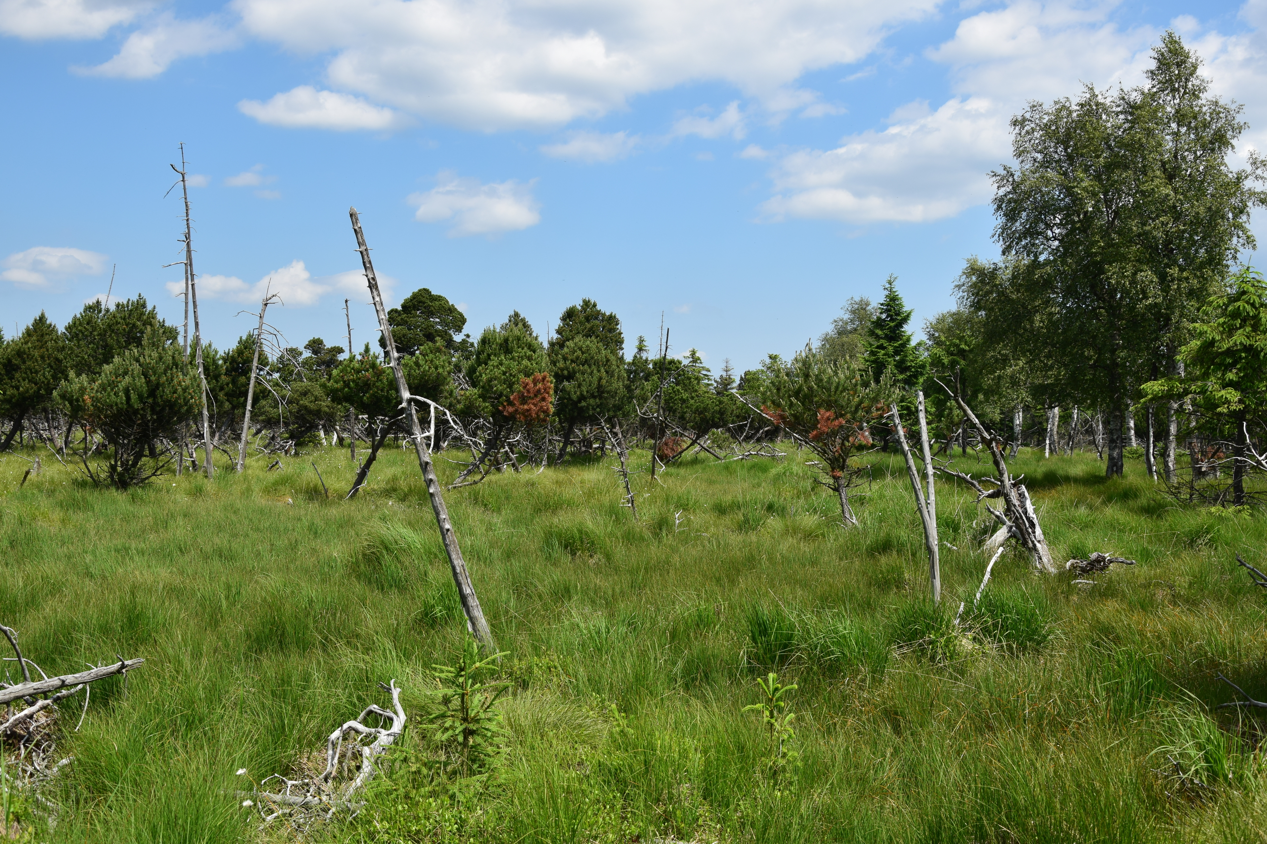 Novodomské rašeliniště – celkový pohled na část Načetínského rašeliniště